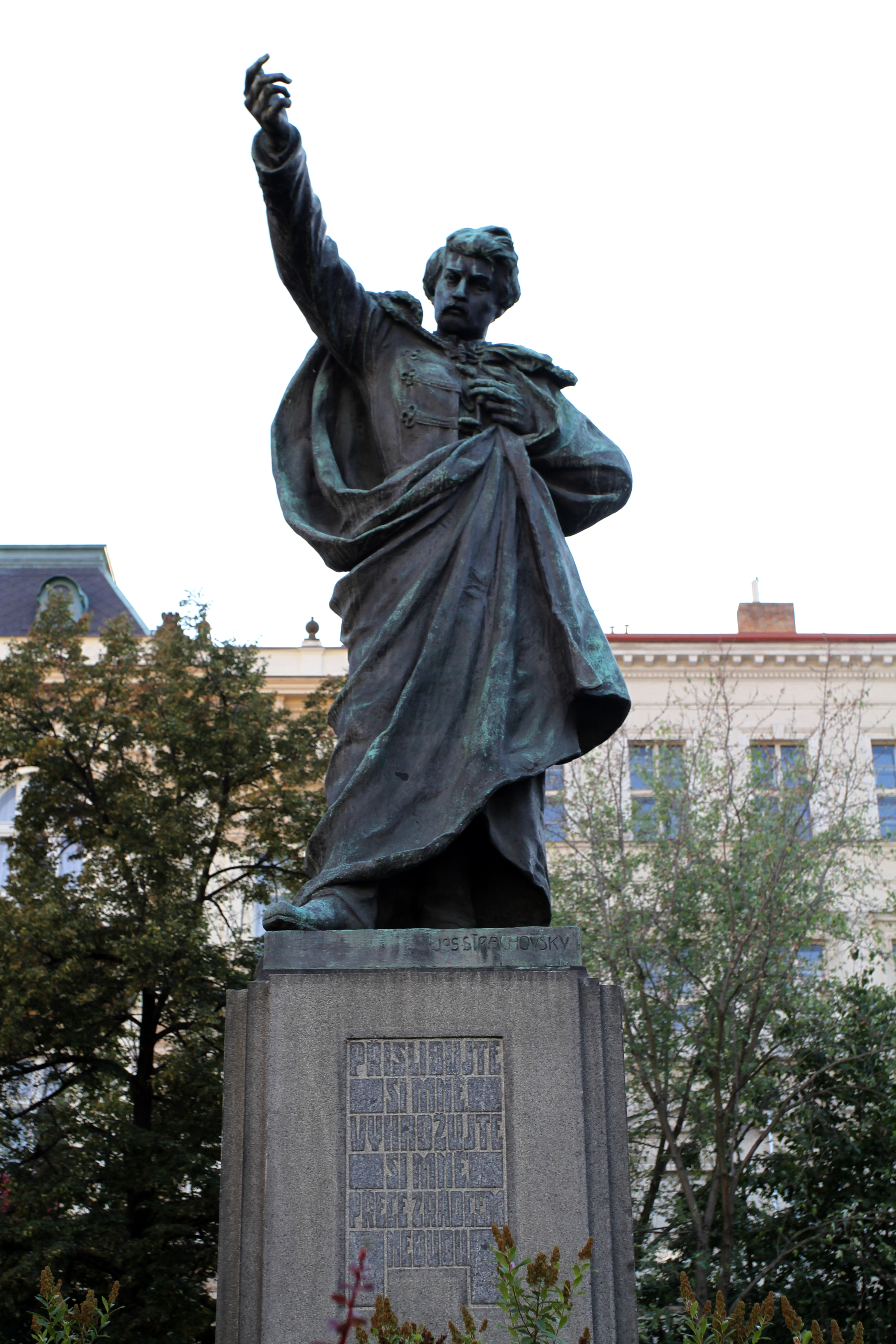 Pomník Karla Havlíčka Borovského (Žižkov), Praha 3, Havlíčkovo nám., Žižkov